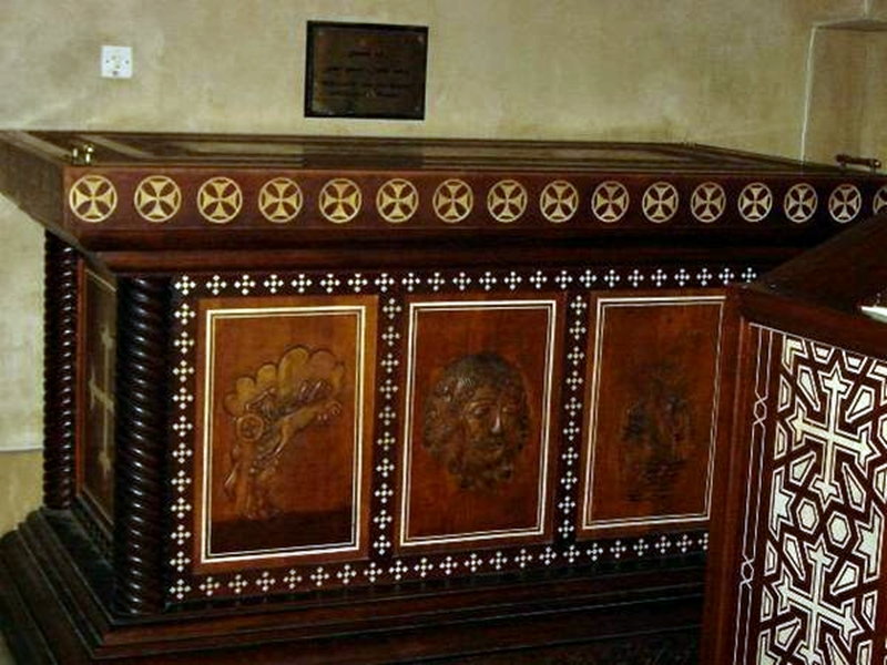 مقصورة يوحنا المعمدان وأليشع النبي حيث يتم حفظ رفاتهما بدير الانبا مقار، وادي النطرون